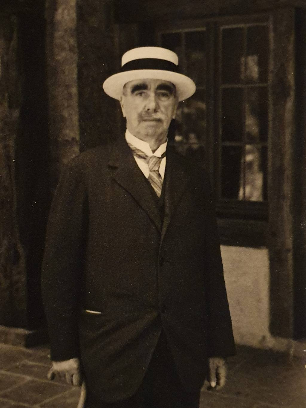 Daniel Campion, Avocat